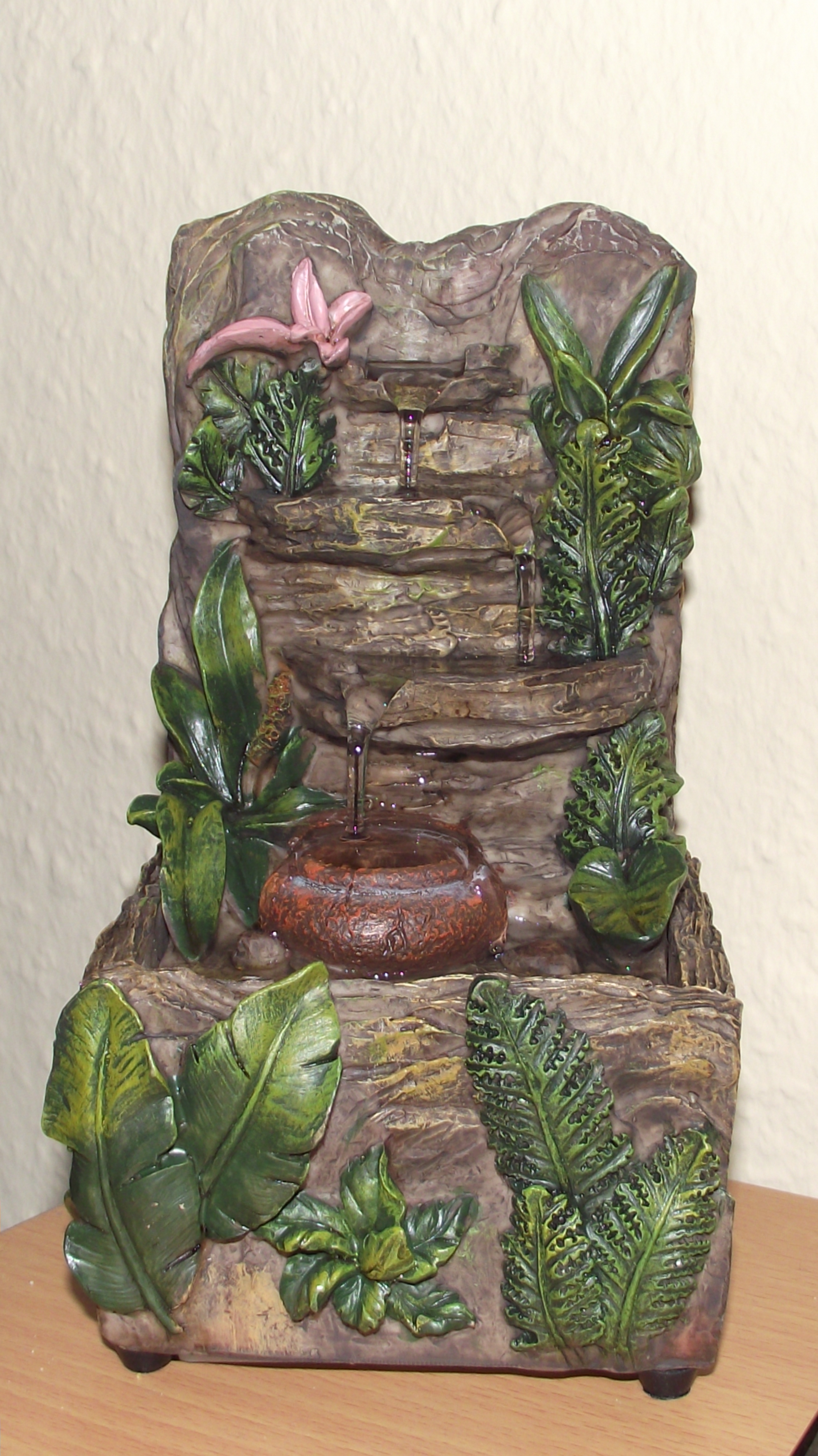 Ein im Urwaldstil gehaltener Zimmerbrunnen